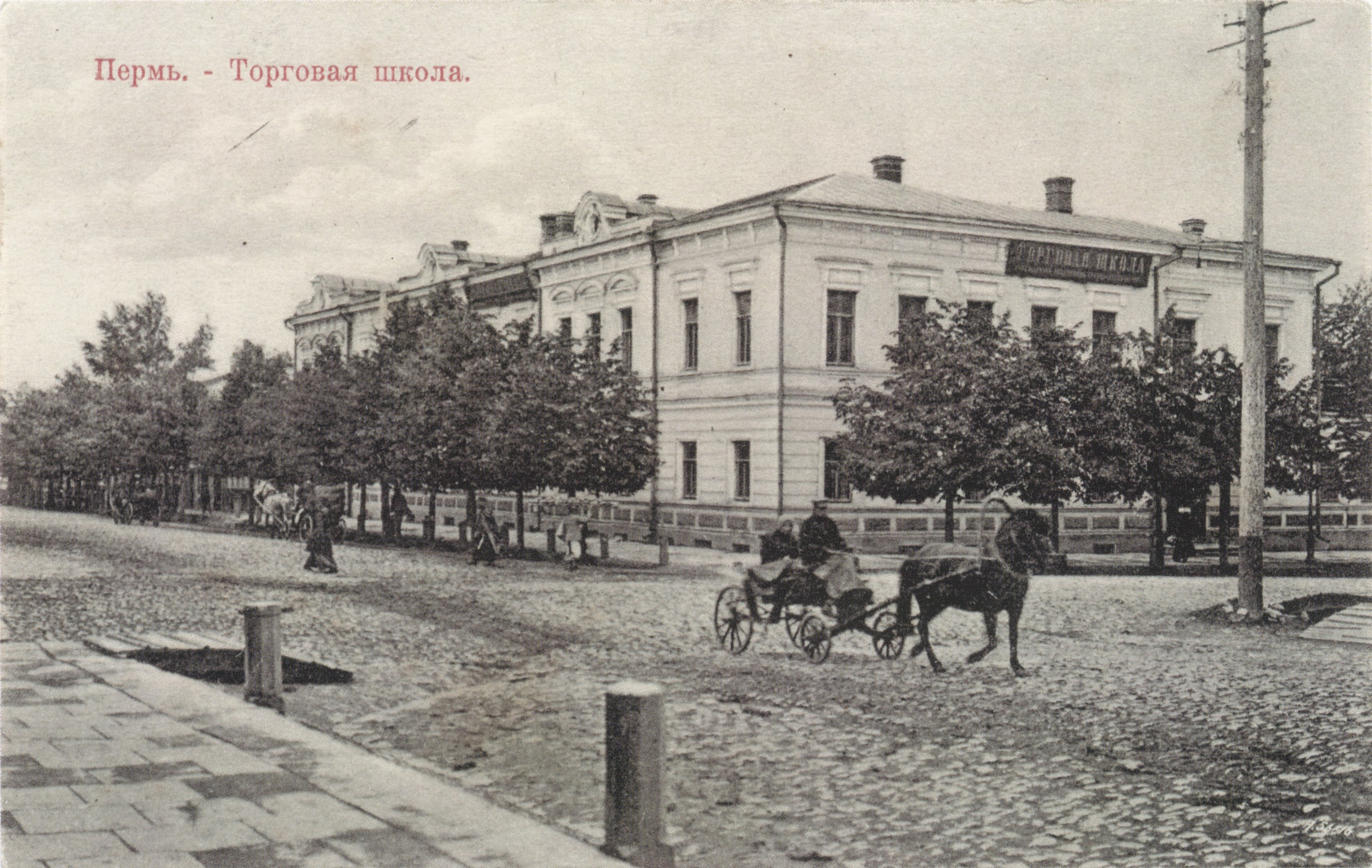 Торговая школа в Перми, ранее Дом Любимова И. И.